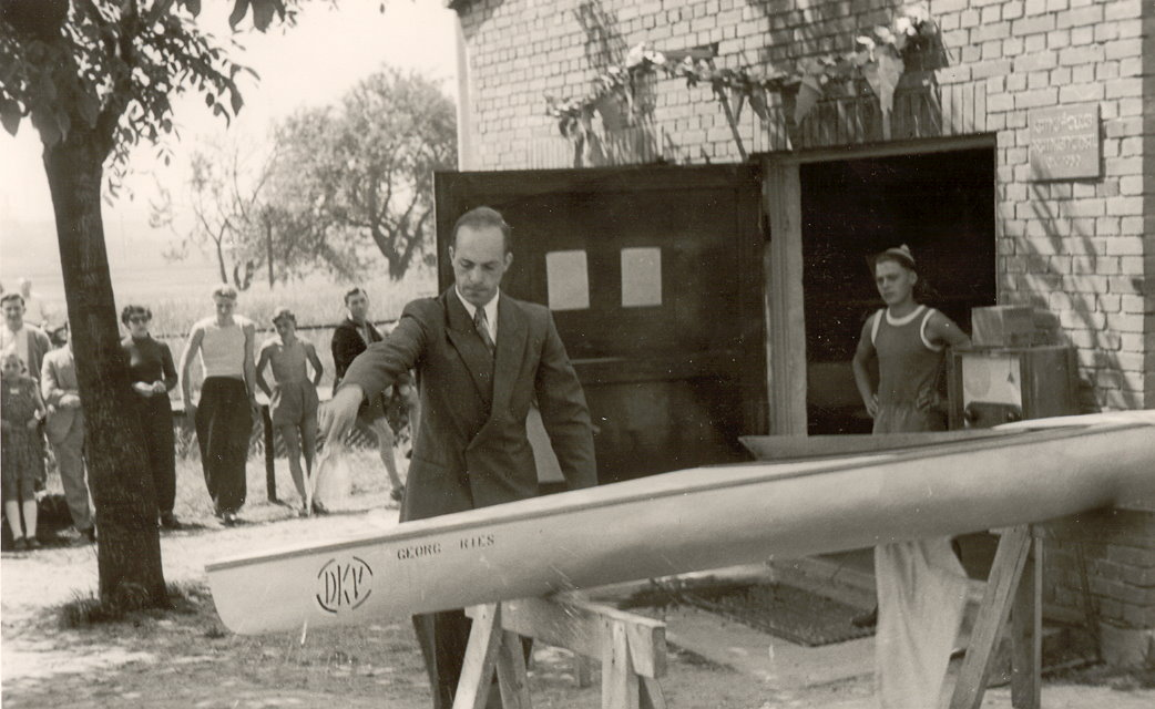 Alubootstaufe Georg Ries